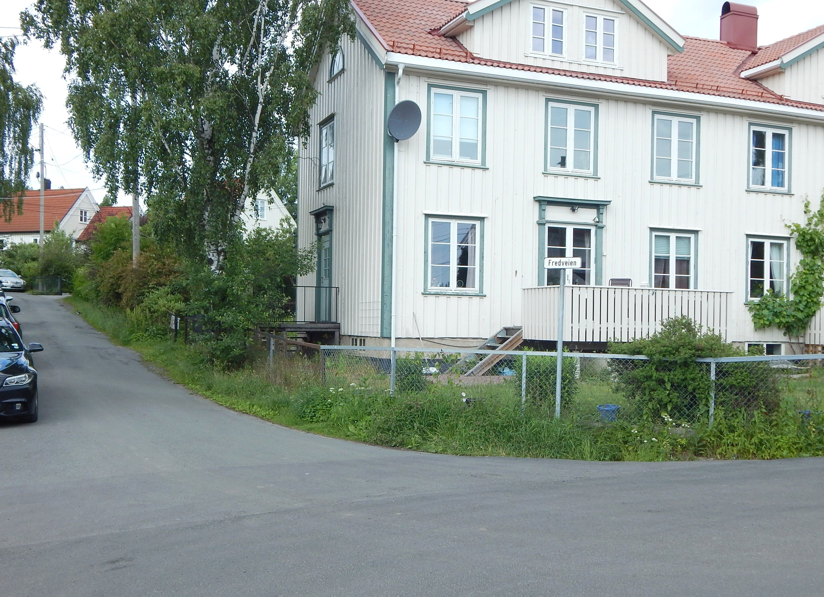 Fredveien sett fra Erlandstuveien